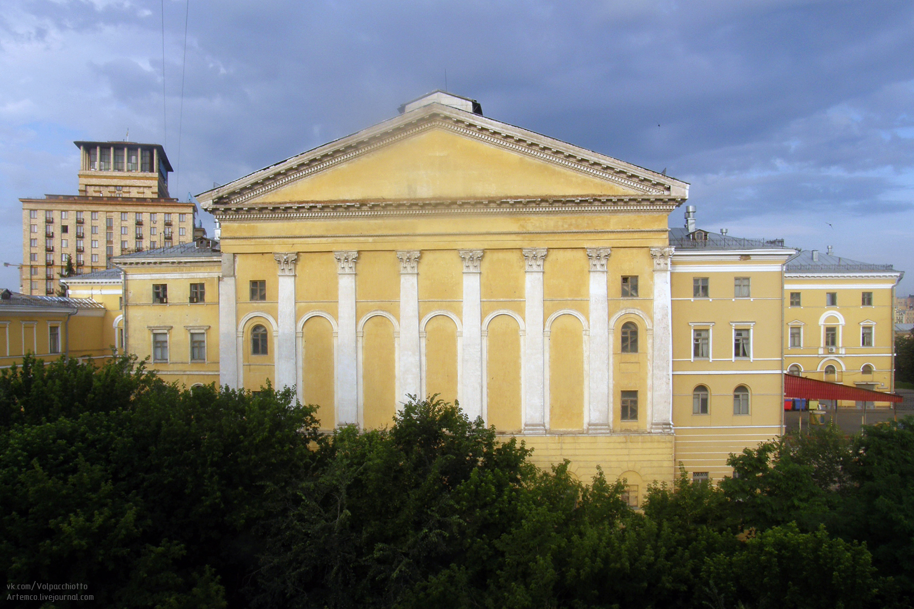 задний фасад Октябрьского дворца